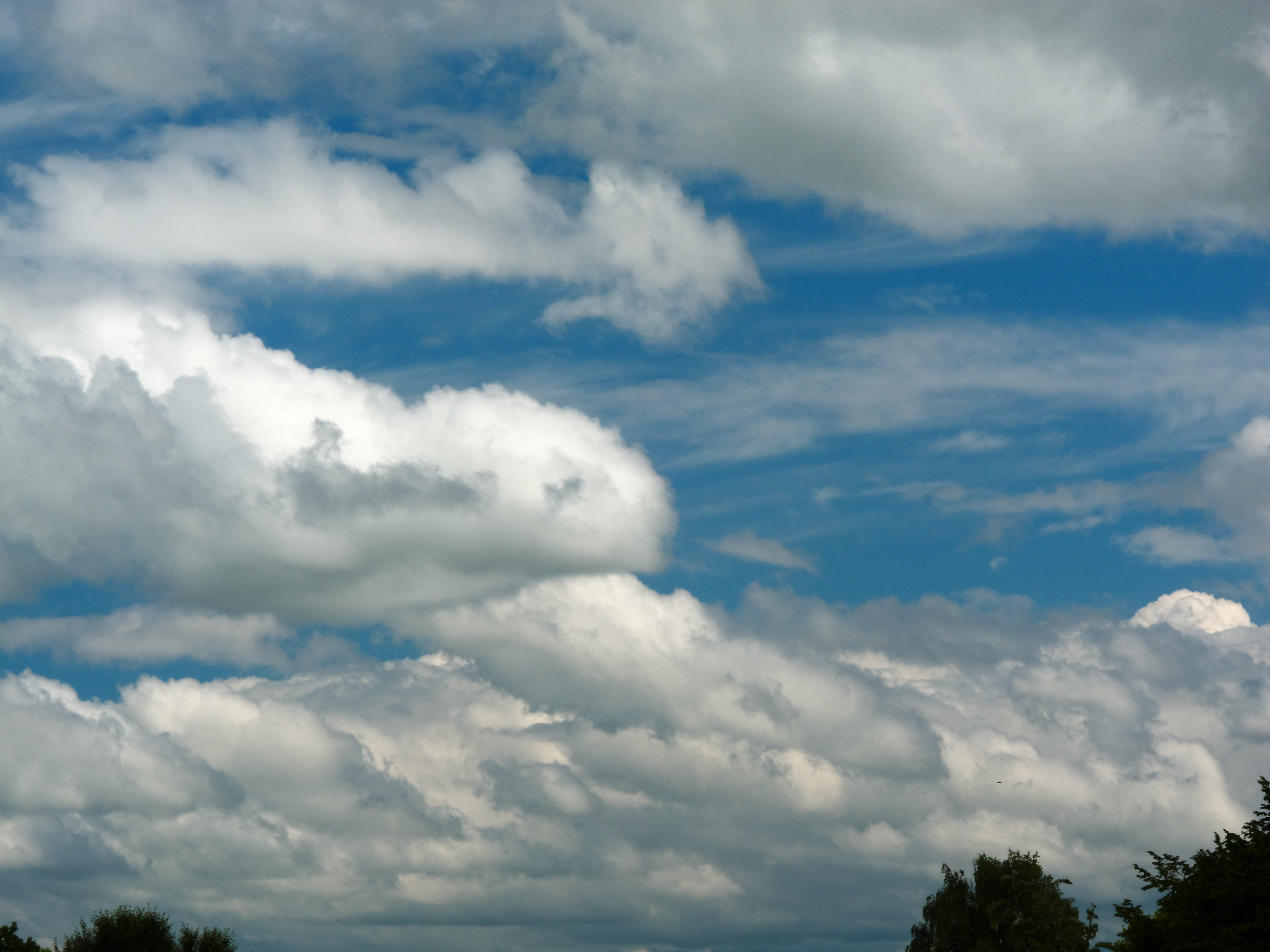 Cumulus mediocris en général dans cette photo mais on voit également le choux-fleur d'un cumulus congestus à droite en arrière-plan. Photo prise avec un filtre polarisant.